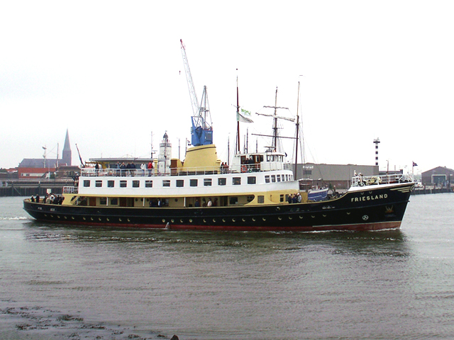 MS Friesland in Harlingen tijdens jubileum VVV-Vlieland IMO-nummer: 5121562